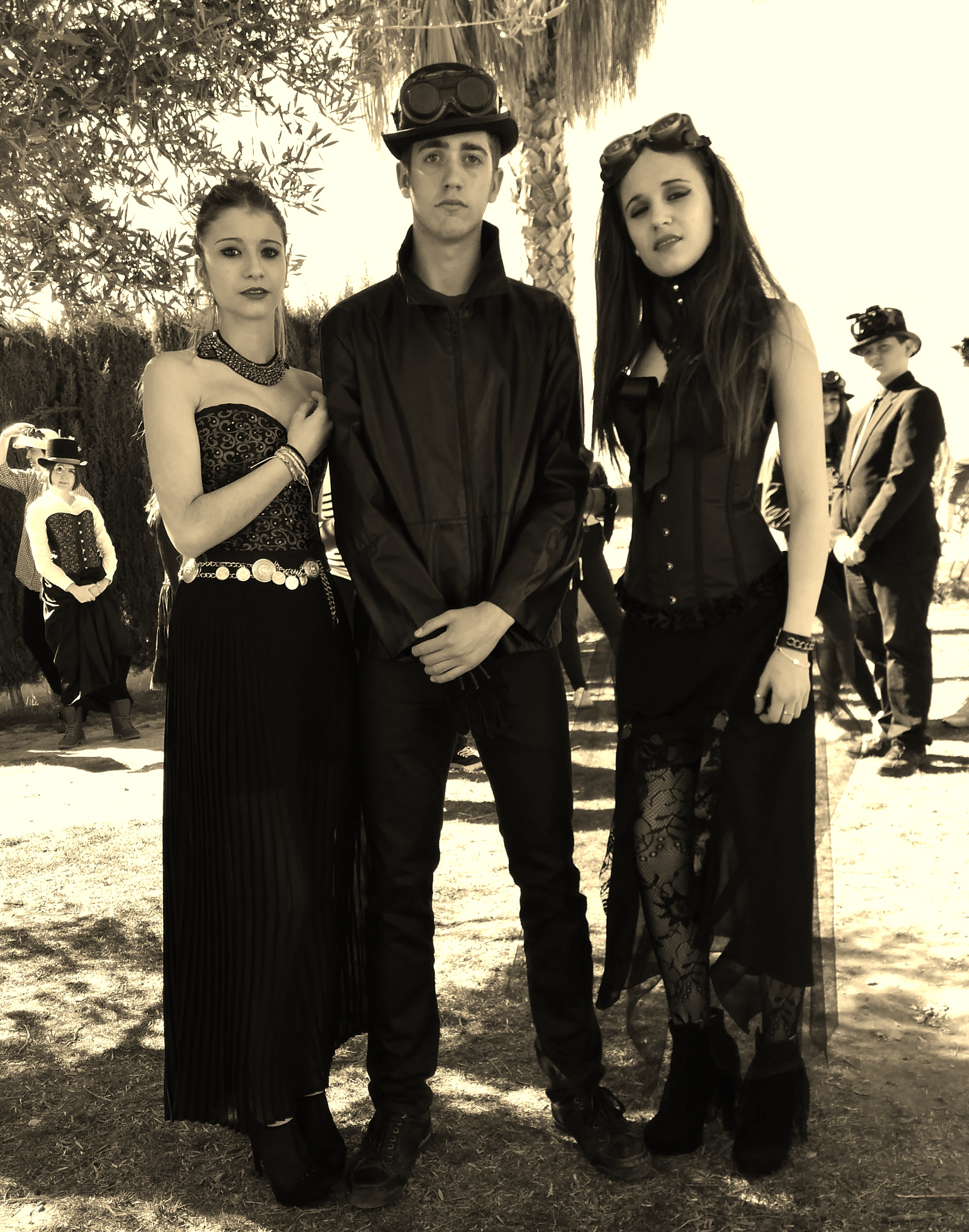 Posat durant un esdeveniment teatral del gènere steampunk